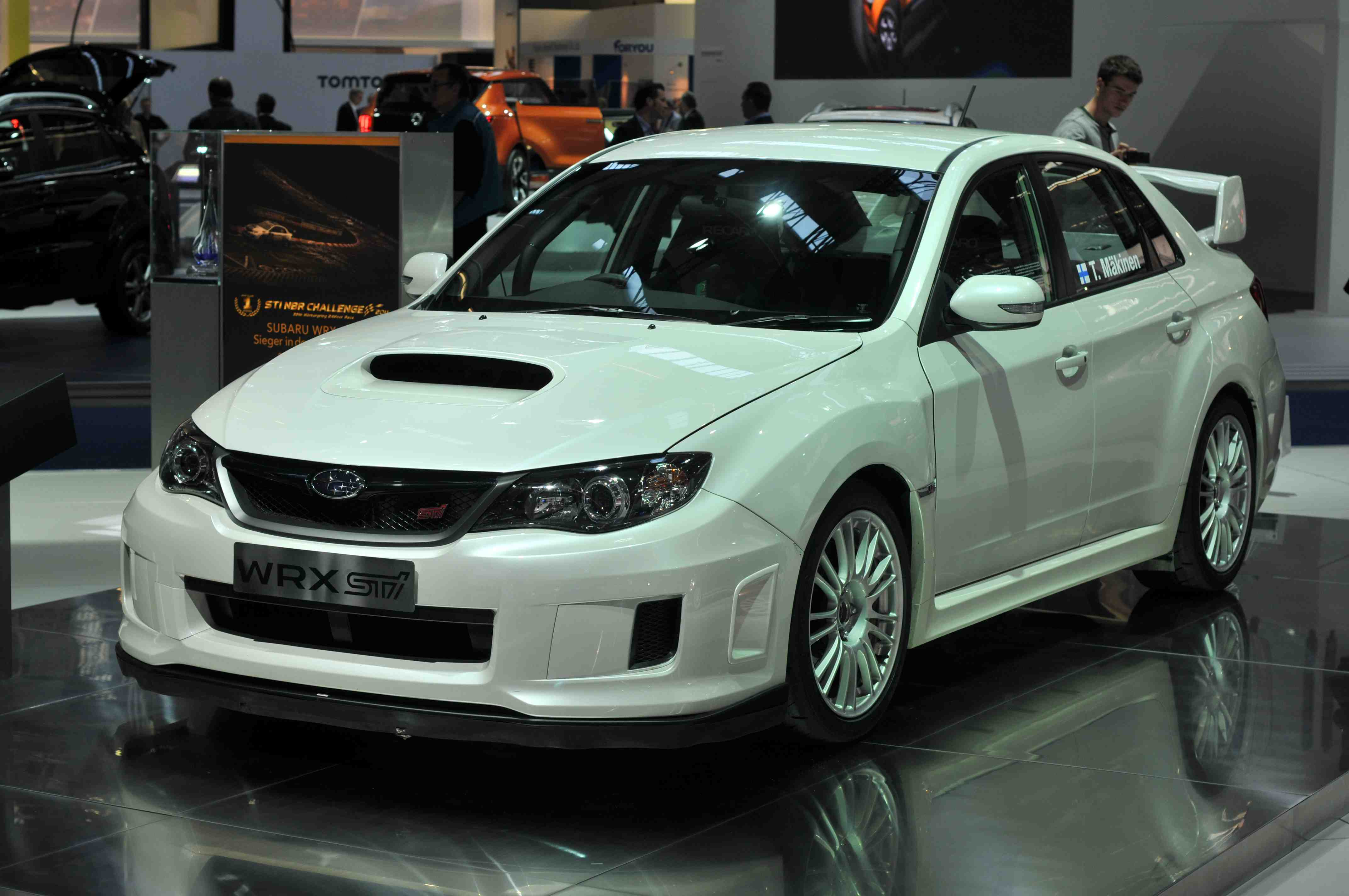 IAA 2011 - Internationale Automobilausstellung in Frankfurt/Main